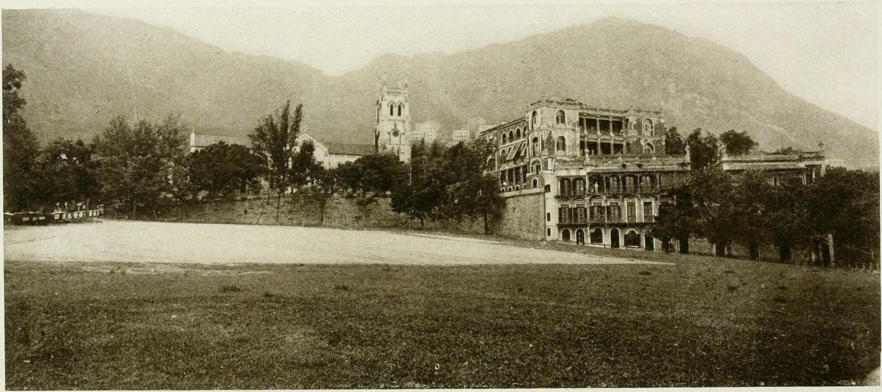 Parade Ground, Hong Kong